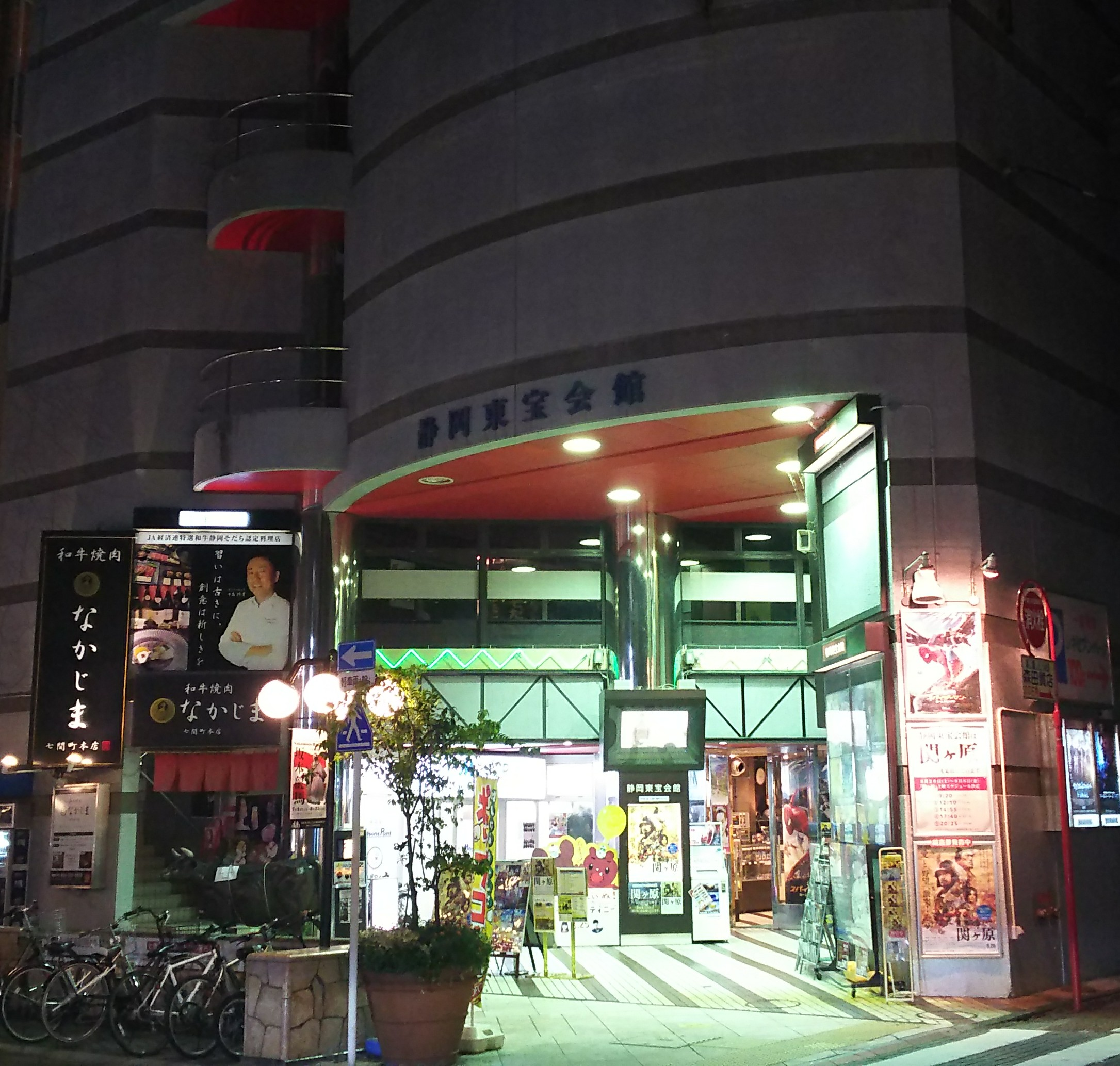 静岡県静岡市七間町にある映画館「静岡東宝会館」。